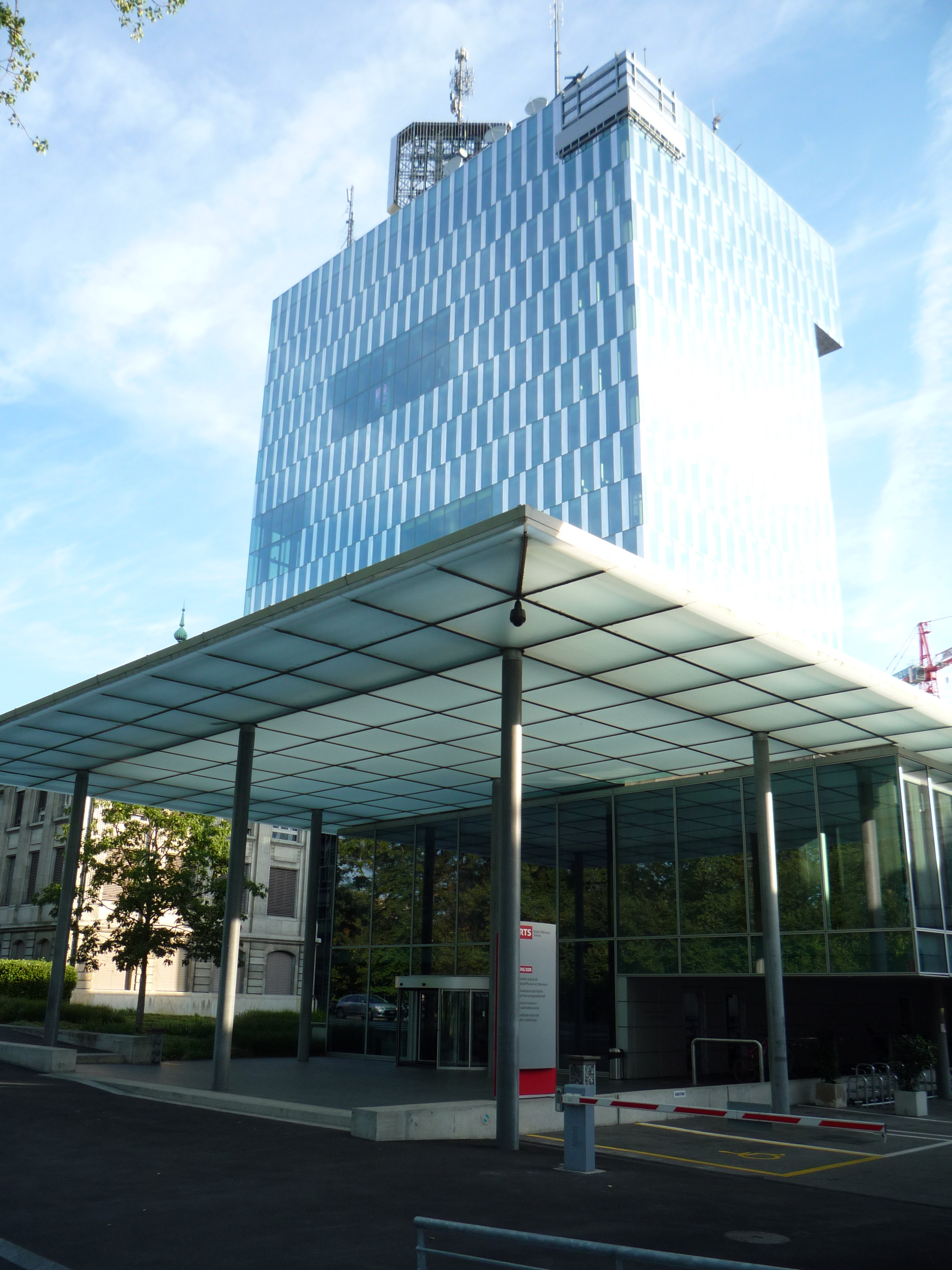 La tour de la radio télévision suisse romande, située au 20 quai Ernest Ansermet à Genève, a été projetée en 1963, construite à partir de 1968 et inaugurée en 1973. C'est l'architecte Arthur Bugna qui en est l'auteur. Entre 2005 et 2010, une importante rénovation de la tour, tant intérieure qu'extérieure à eu lieu. Elle a notamment été désamiantée et l'enveloppe extérieure est différente depuis, il ne restait de l’ancienne tour TSR que la structure porteuse interne. C'est le bureau d’architectes genevois « dla Devanthéry & Lamunière qui s'en est chargé. Pour le coût des travaux de rénovation, 14 millions de francs pour l’assainissement et 39 millions pour rebâtir. En 2012, des problèmes d’infiltrations d’eau sont apparus lors de fortes pluies, remédiés depuis. Sources